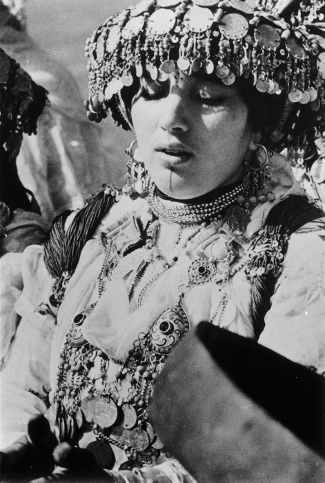 De vrouw behoort tot Zaian, een Berbergroep uit de buurt van Khenifra (Midden-Atlas).